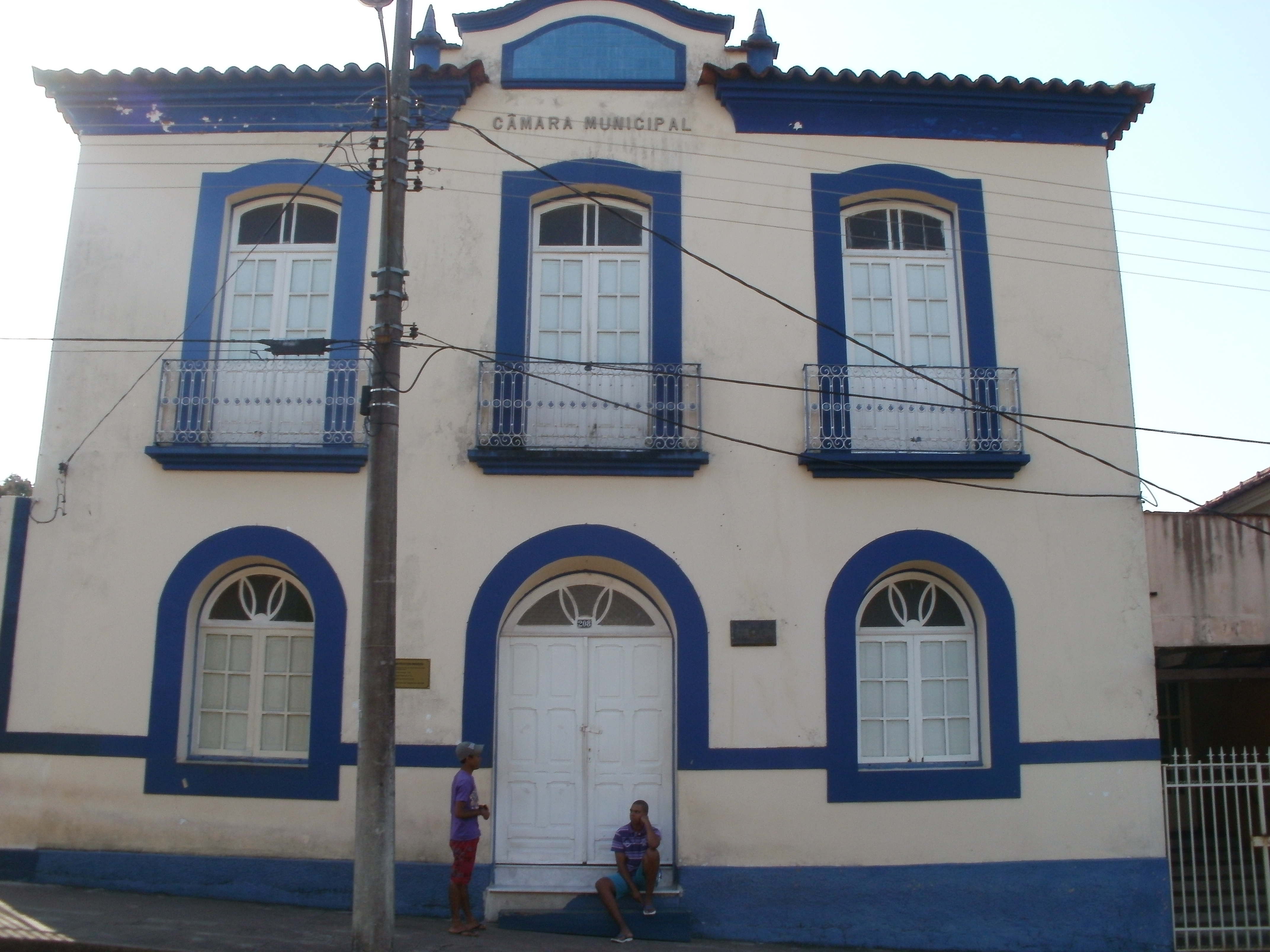 Prefeitura e Câmara Municipal situado no Centro de Andrelândia, Minas Gerais, Brasil.